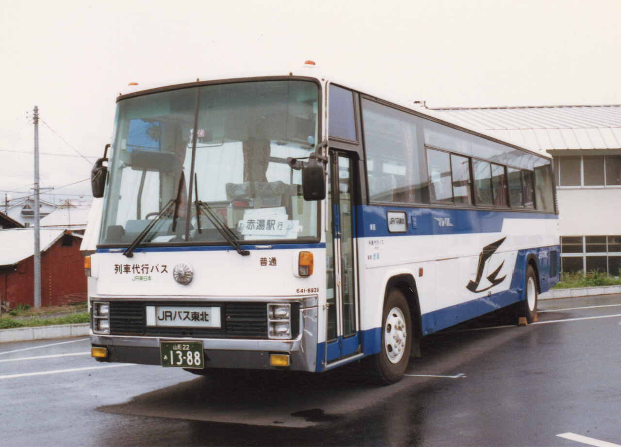 列車代行バス 赤湯営業所 641-6939 山形22あ1388（旧：宮22か2746）